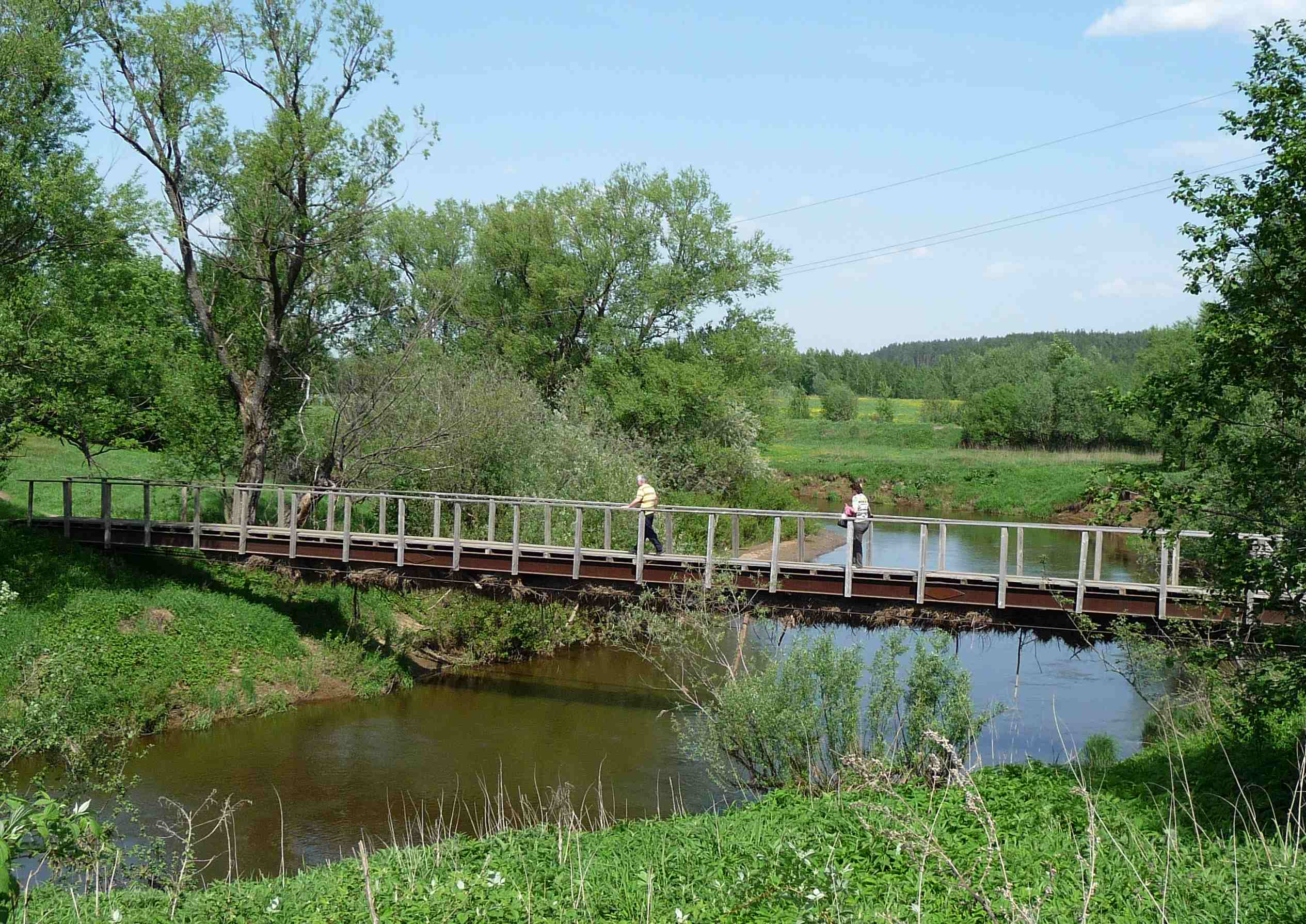 Пешеходный мост через Ворю в деревне Кармолино Щёлковского района Московской области